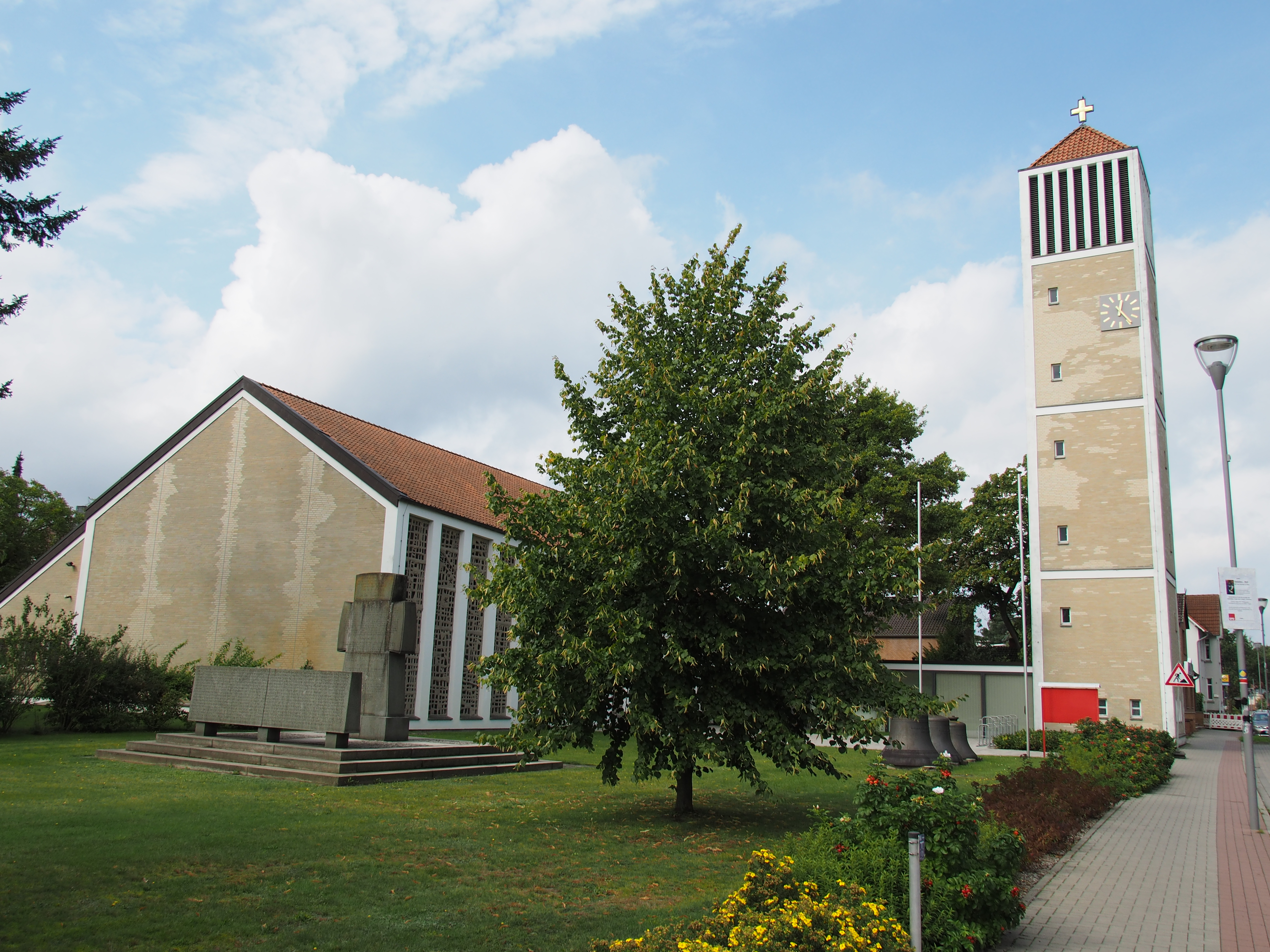 Evangelisch luth. Kirche St. Michael in Wietze-Steinförde (Niedersachsen)